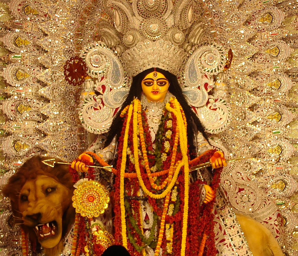 Jagaddhatri Puja in Kolkata